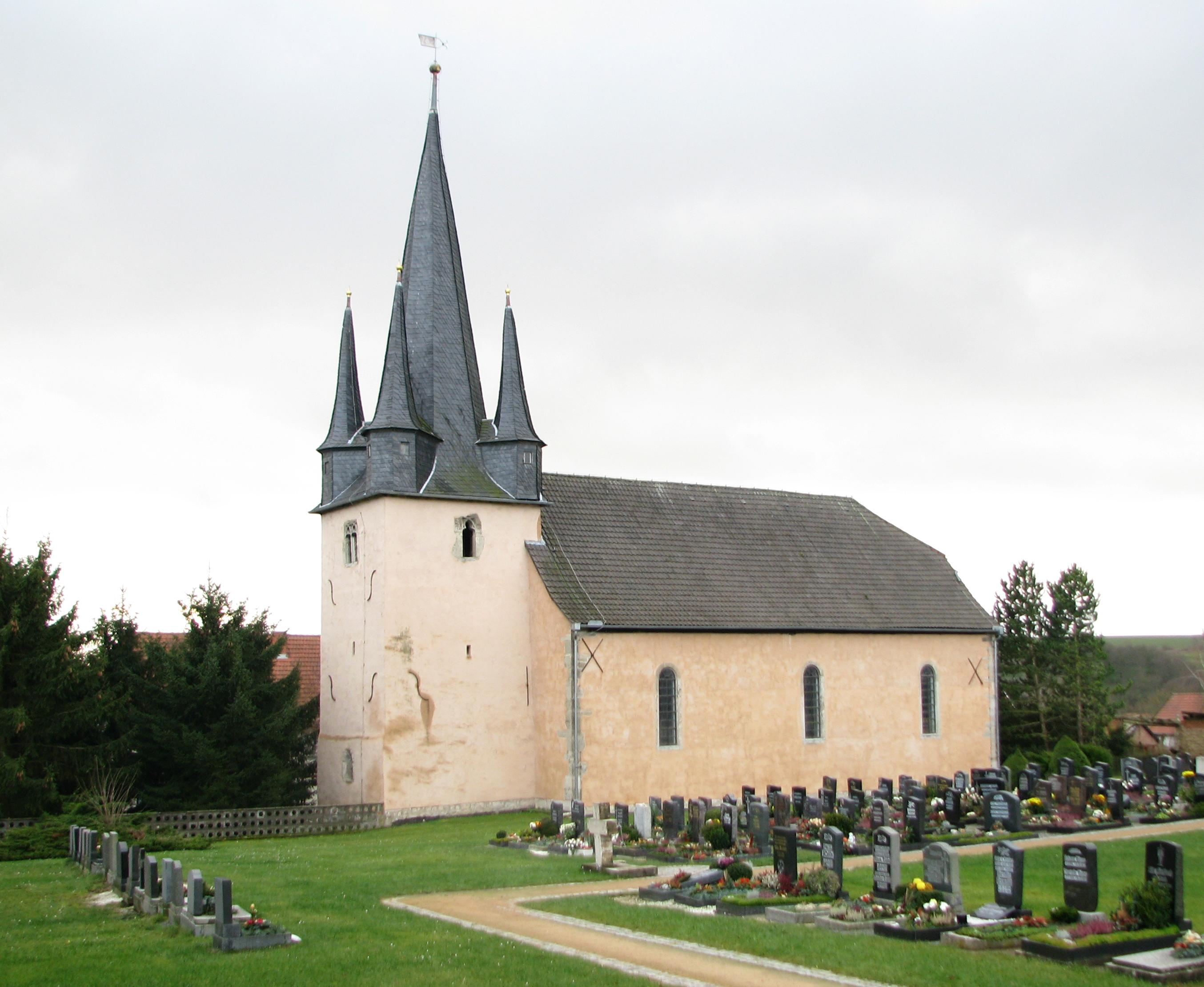 Sankt Pankratius in Horsmar mit Friedhof von Nordosten gesehen.